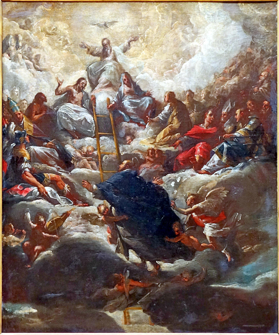 L'apothéose de saint Thomas d'Aquinlabel QS:Lfr,"L'apothéose de saint Thomas d'Aquin"